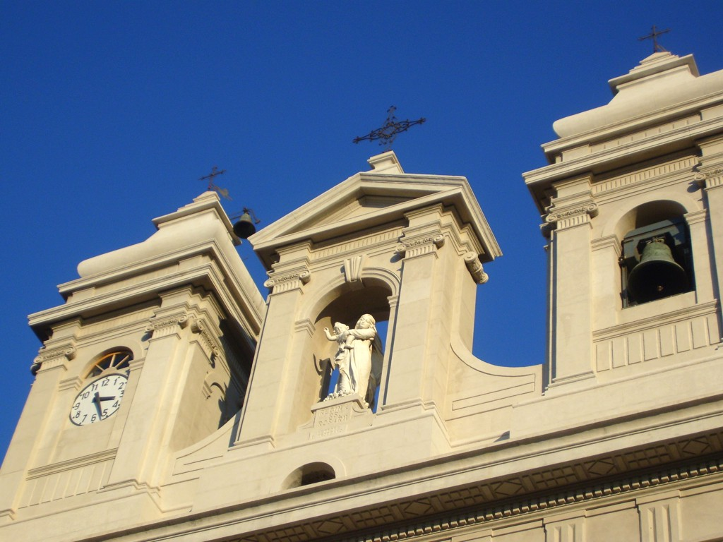 Santuario Madonna del Rosario (parte alta facciata) - Cittanova (RC)